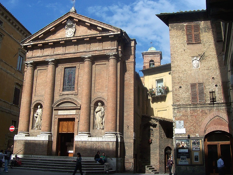 Siena - Chiesa di S. Cristoforo